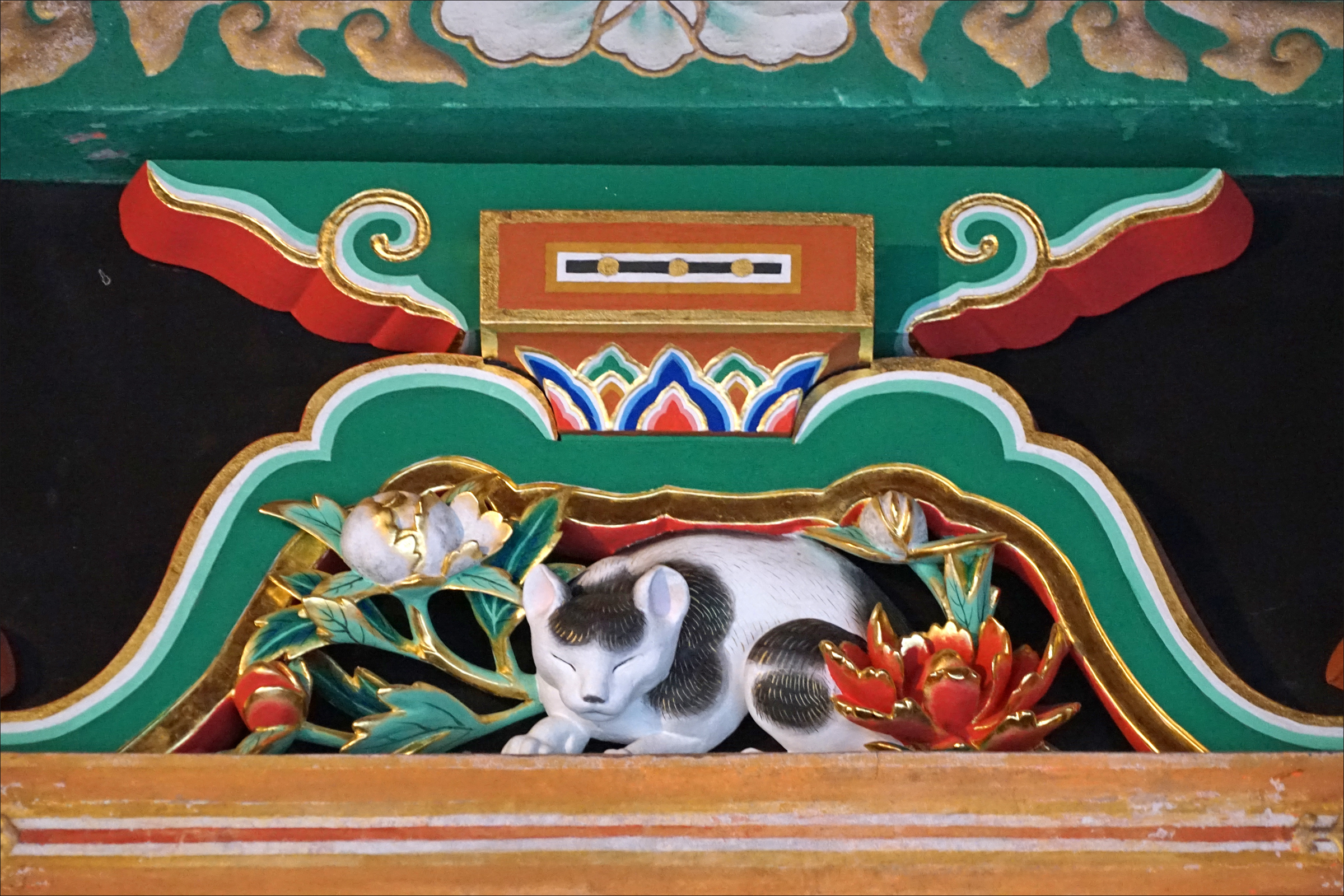 Le chat qui dort (sleeping cat / Nemuri-neko) protège la porte d'entrée de la tombe du shogun Ieyasu Tokugawa dans le sanctuaire shinto de Nikko au Japon Au dos de cette sculpture, deux hirondelles ont été sculptées. Le chat et l'hirondelle symbolisent la force et la fragilité à l'image de la période de paix qu'a connue le Japon grâce au shogun Ieyasu Tokugawa après des siècles de guerre civile. L'artiste qui a réalisé cette sculpture, comme beaucoup d'autres visibles sur les bâtiments du sanctuaire, est Hidari Jingorô (1584-1644) L'oeuvre sur Wikipedia